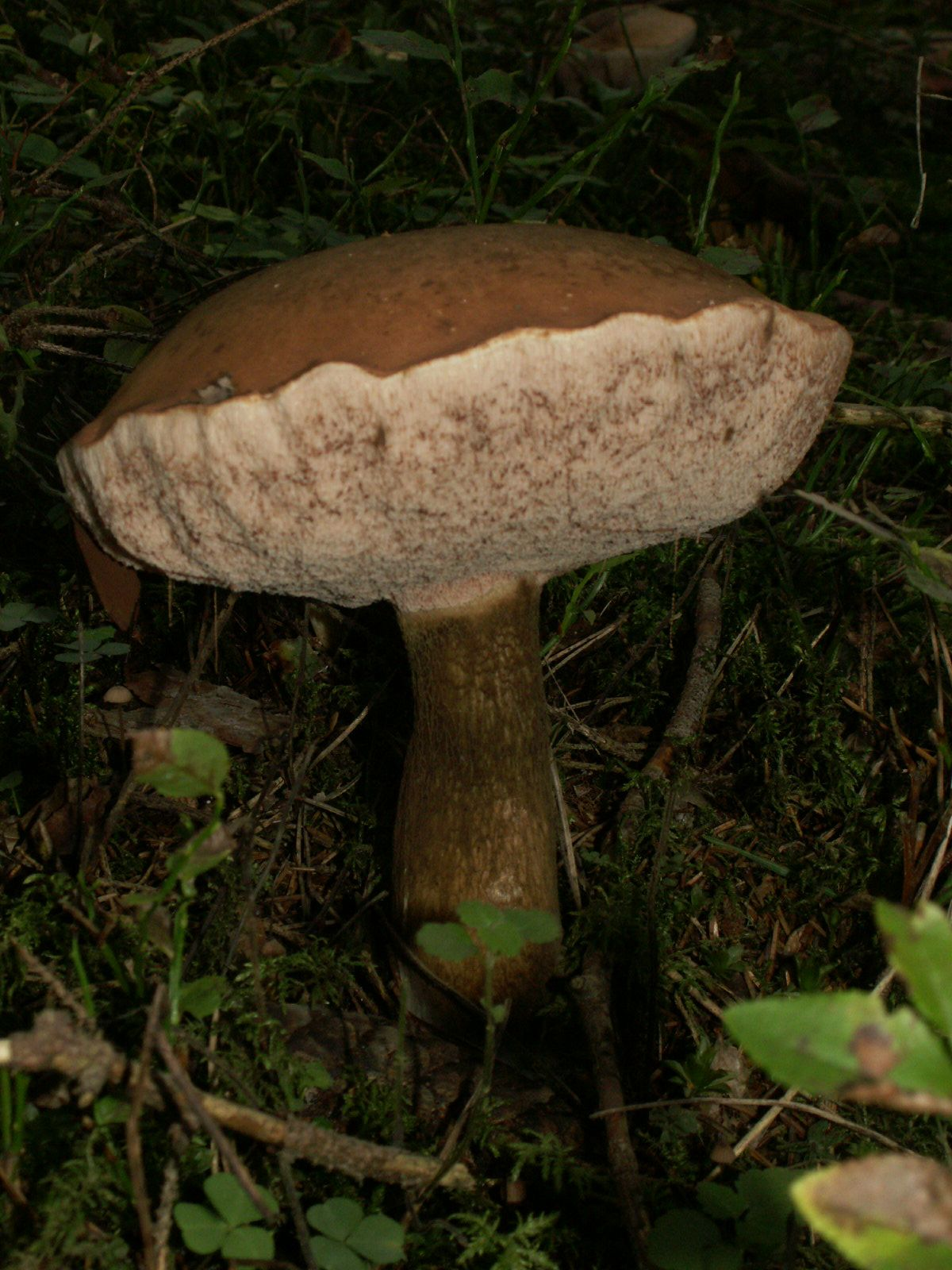 Tylopilus felleus Je ne crois pas qu'il s'agisse de tylopilus felleus, ça ressemble plutôt a boletus scaber ou leccunum scabrum--Breugelius (talk) 10:09, 20 August 2011 (UTC)